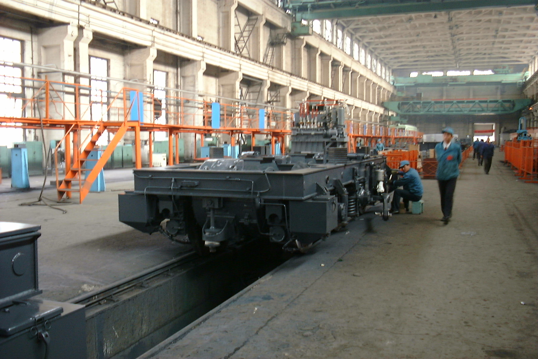 Bogies